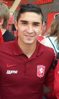 Felipe Gutiérrez op de open dag van FC Twente